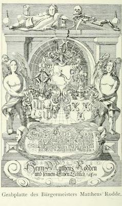 Zeichnung der Messinggrabplatte des Lübecker Bürgermeister Matthäus Rodde (gest. 1677) in der Lübecker Marienkirche. Gefertigt von Wolffgang Hartmann um 1658 (tätig Mitte des 17. Jh. u. a. in Stockholm, Riga und Rostock; Thieme-Becker, Band 16, S. 86)